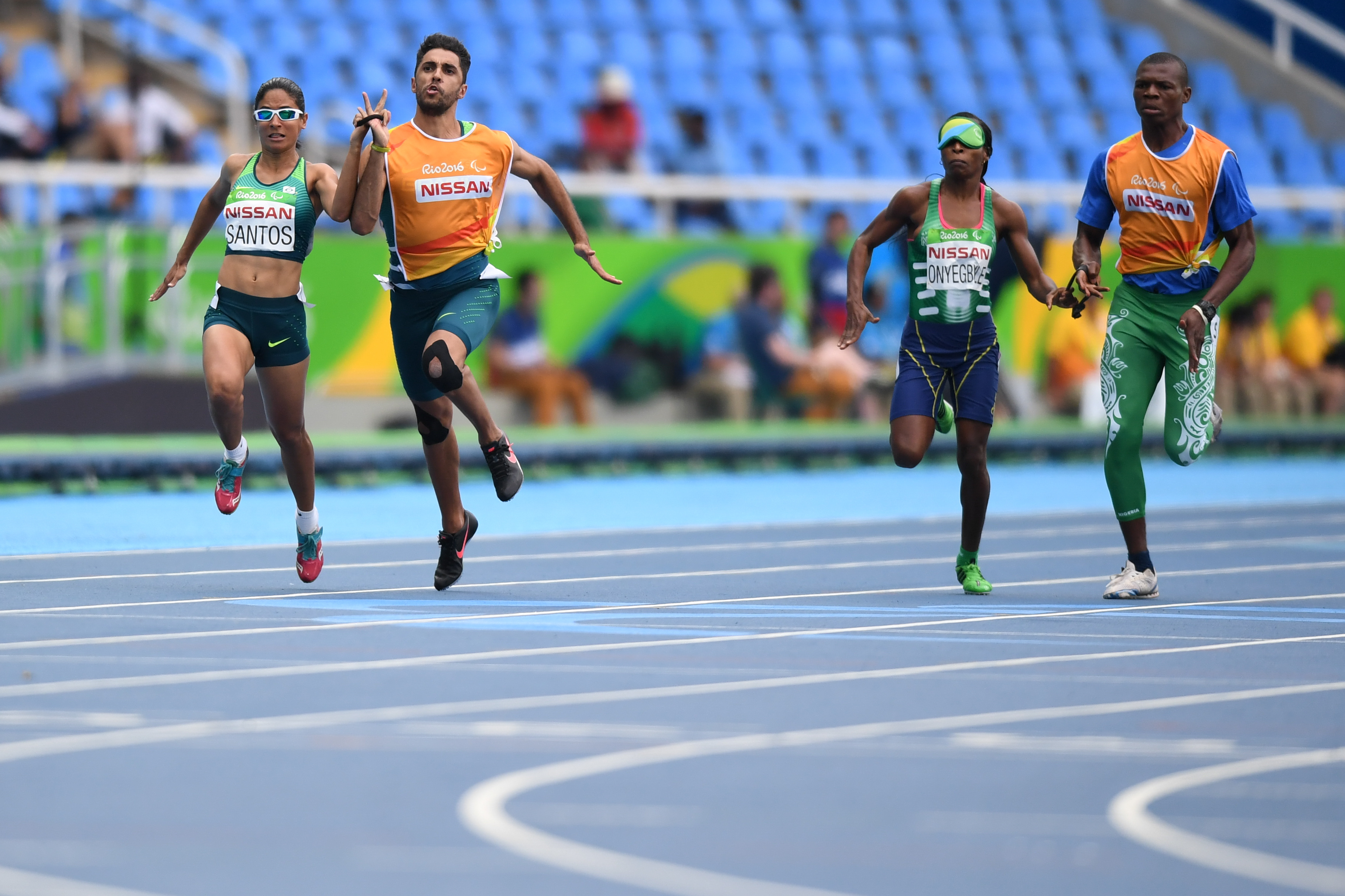 Rio de Janeiro - Primeiro dia das provas de atletismo nos Jogos Paralímpicos Rio 2016 (Tânia Rêgo/Agência Brasil)